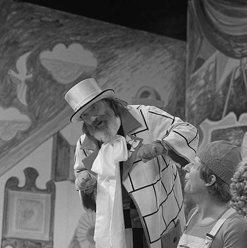 Pieke Dassen in de Nederlandse kinderserie De film van Ome Willem in 1981